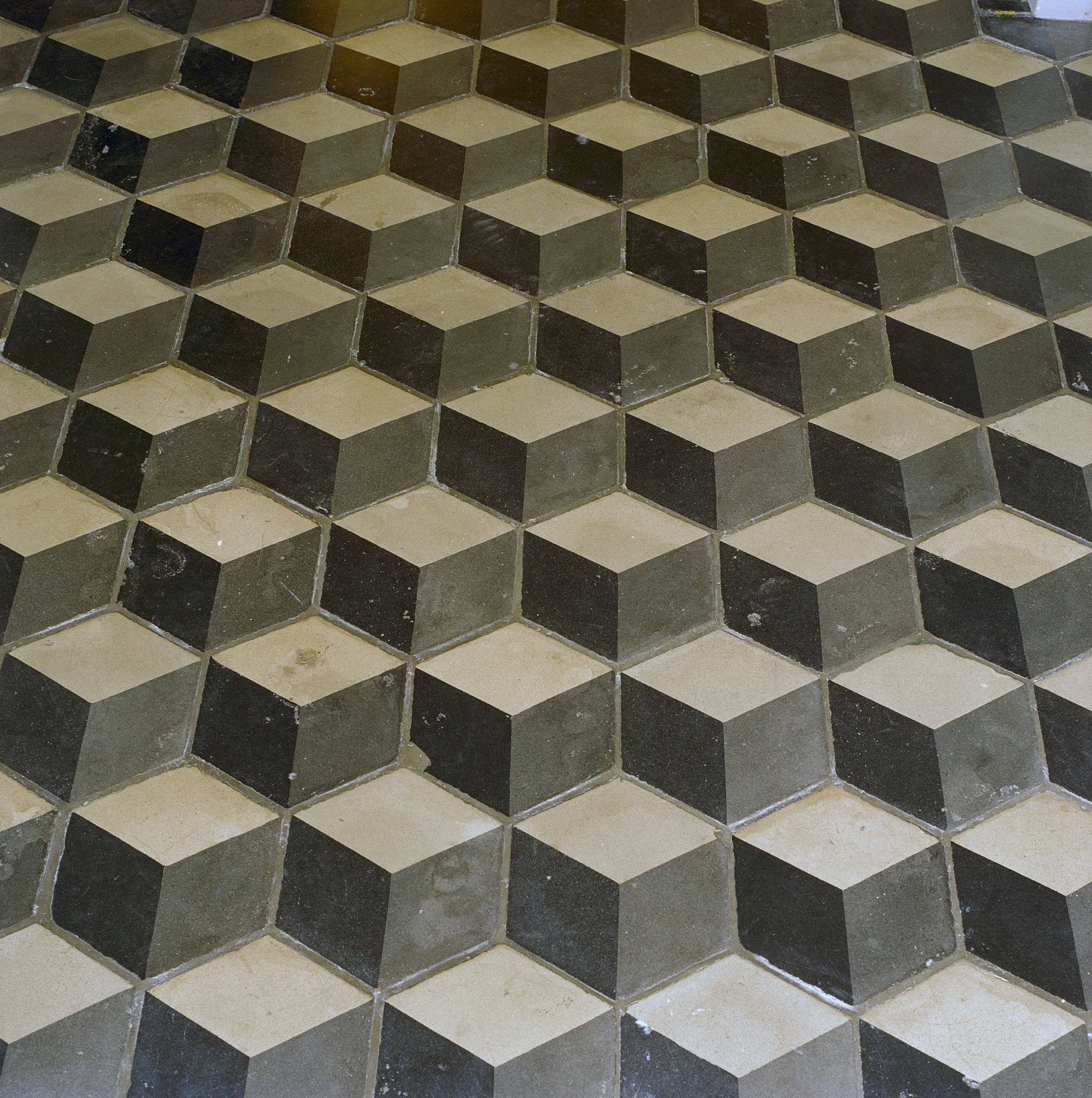 voormalige pastorie: Interieur, begane grond, hal, detail: blokvormige vloerbetegeling